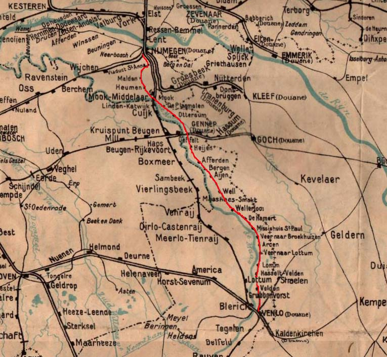 Kaart circa 1915, bewerkt looi